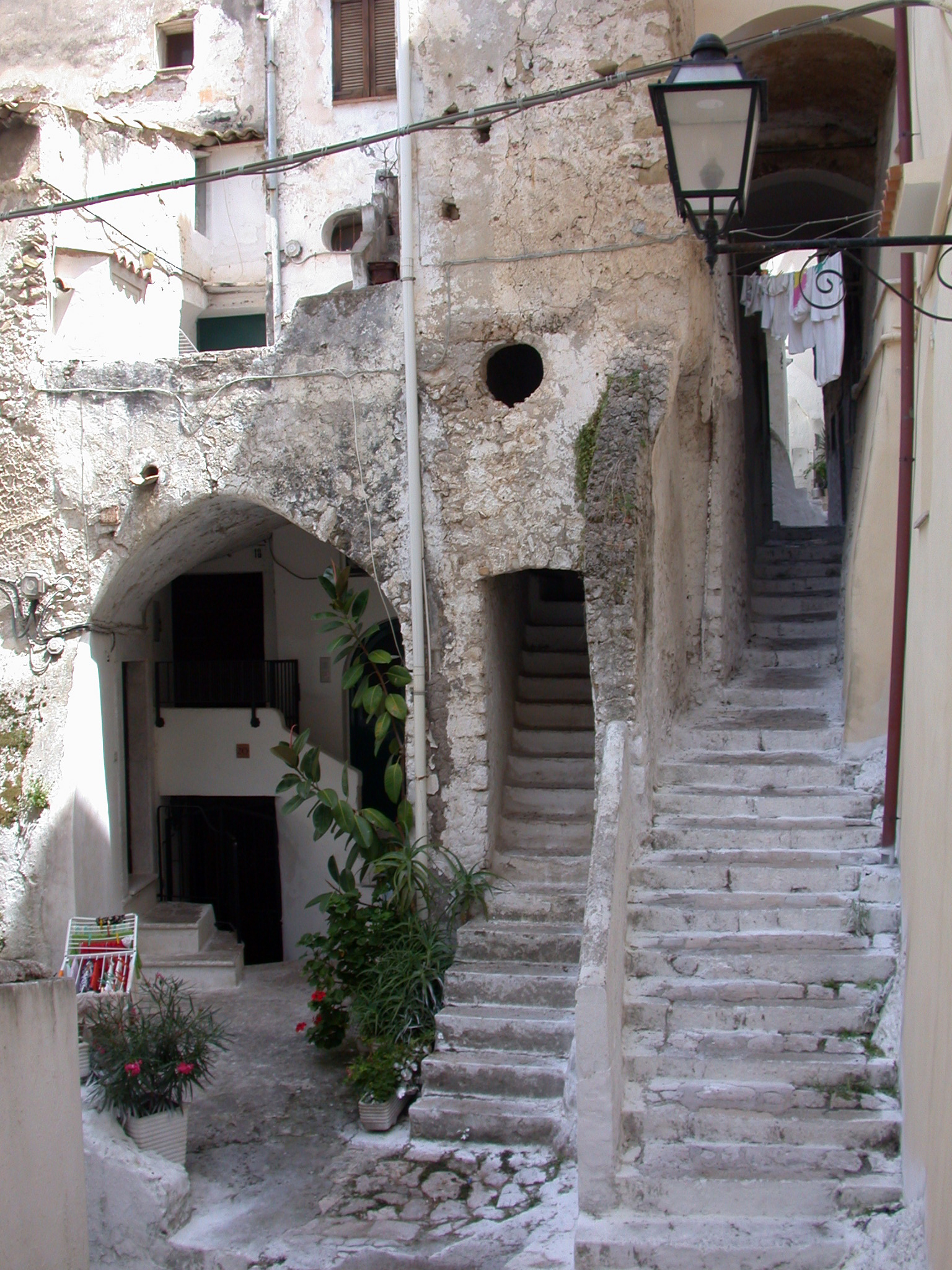 Sperlonga (Italia, Lazio, provincia di Latina). Angolo caratteristico.